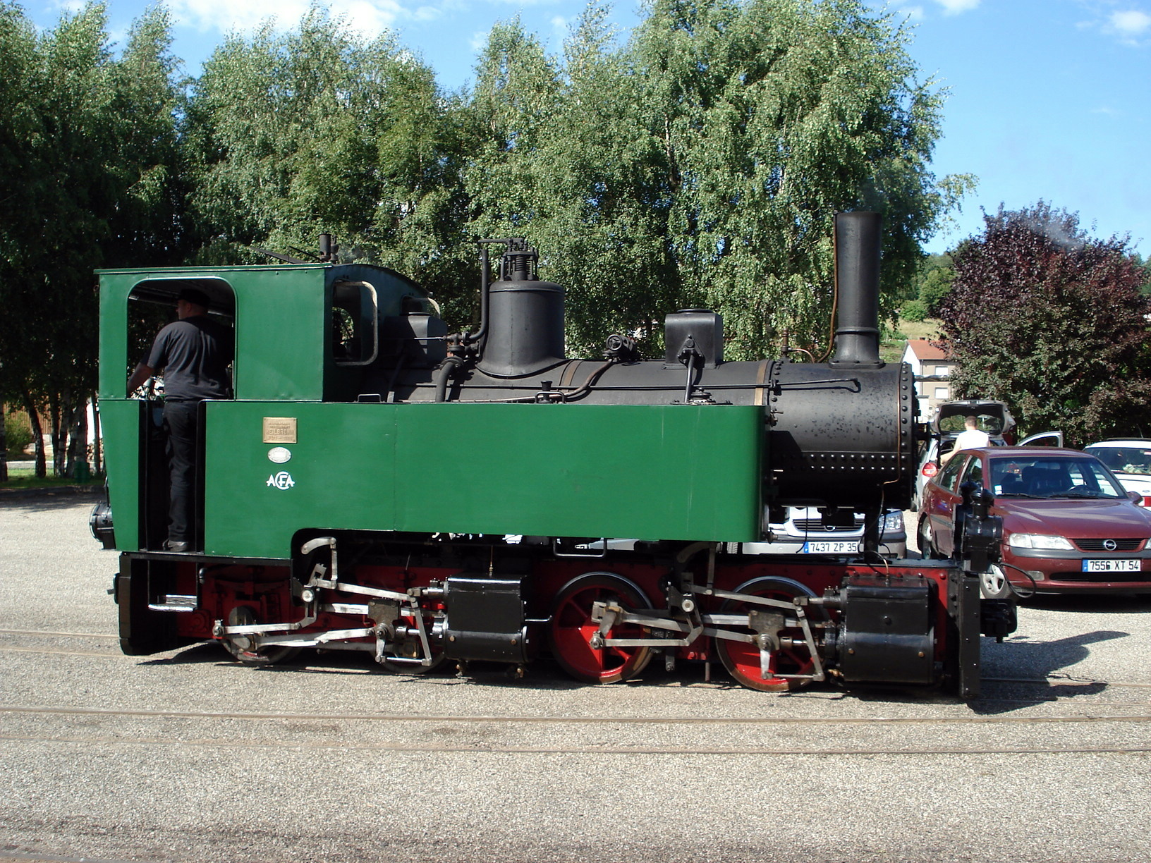 Abreschviller, comm. du dép. de la Moselle, France (région Lorraine). Train touristique (ancien chemin de fer forestier). Locomotive à vapeur Mallet (Maschinenfabrik Heilbronn) n°476, de 1906.